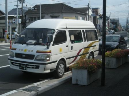 築城町コミュニティバス